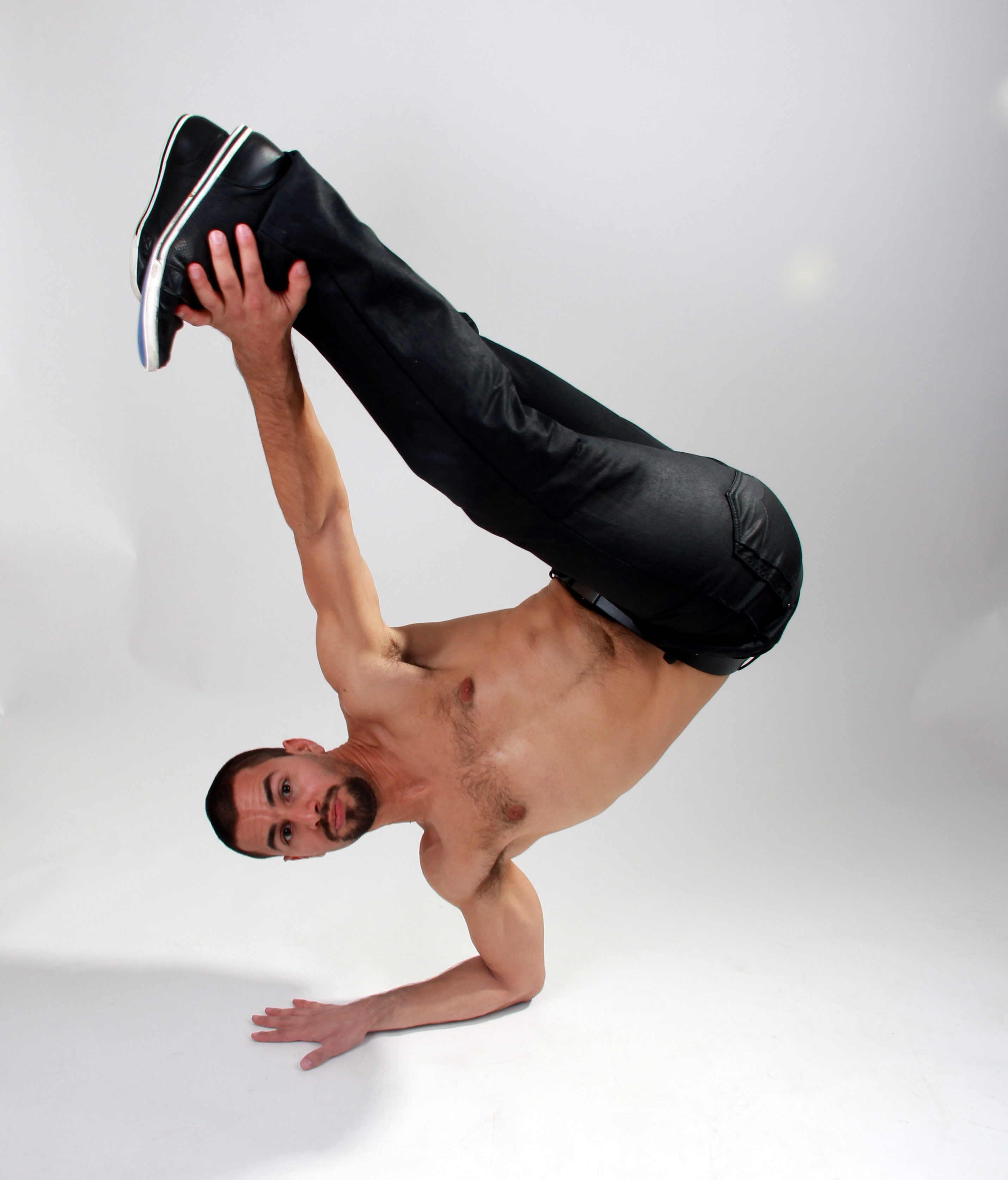 סטפר בתרגיל ברייקדאנס